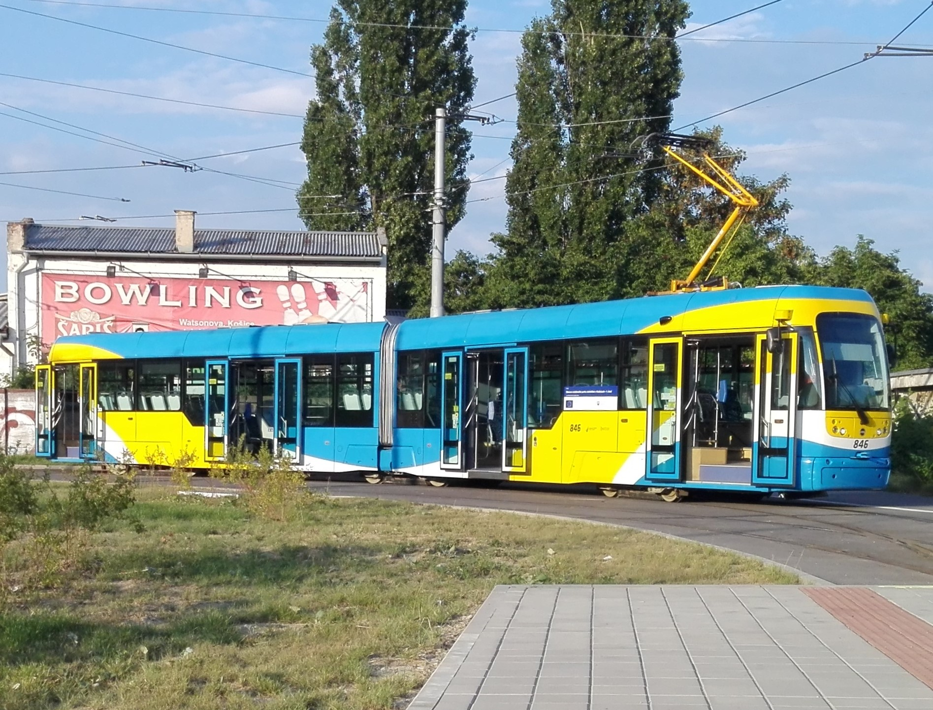 Električka Vario LF2+ v obratisku Botanická záhrada.